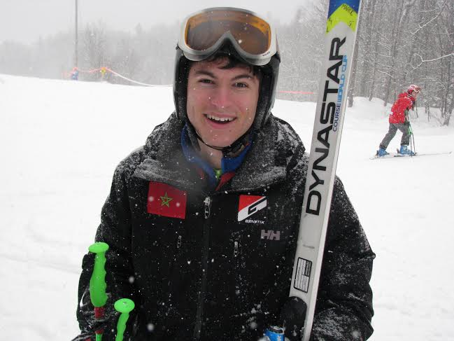 Adam Lamhamedi, skieur alpin marocain